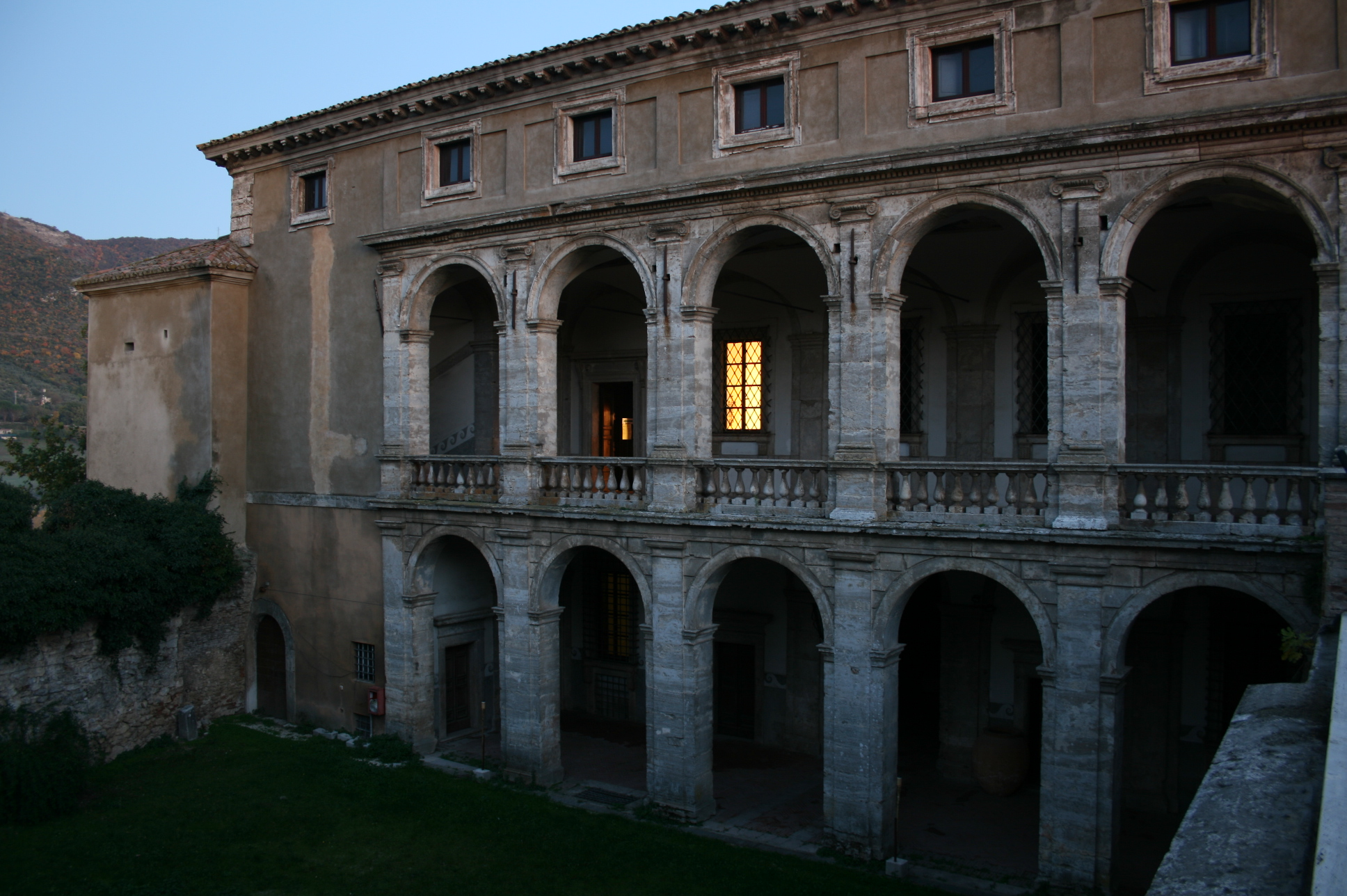 L'incarico di portare a compimento un simile progetto viene affidato, nel 1561, all'architetto fiorentino Guidetto Guidetti, al quale succede, dopo la morte di questi tre anni dopo, il milanese Giovan Domenico Bianchi che da questo momento entra a completo servizio della famiglia. La costruzione del palazzo, iniziata sotto il cardinal Federico, termina verosimilmente intorno all'anno 1579, quando Federico Cesi nipote di Gian Giacomo e padre del futuro fondatore dell'Accademia dei Lincei sposa Olimpia Orsini. L'anno successivo Isabella d'Alviano, sopravvissuta al marito e al figlio, fa restaurare le mura cittadine e alcune strade, oltre a incaricare Bianchi di sistemare la piazza antistante il palazzo. Tra le sue mura, nei primi mesi del 1604, Federico si ritira sconfortato e deluso dall'atteggiamento del padre, intollerante e assai poco comprensivo nei confronti delle attività dell'Accademia dei Lincei fondata alcuni mesi prima, il 17 agosto 1603, dal giovane Federico insieme ad altri tre fraterni amici.